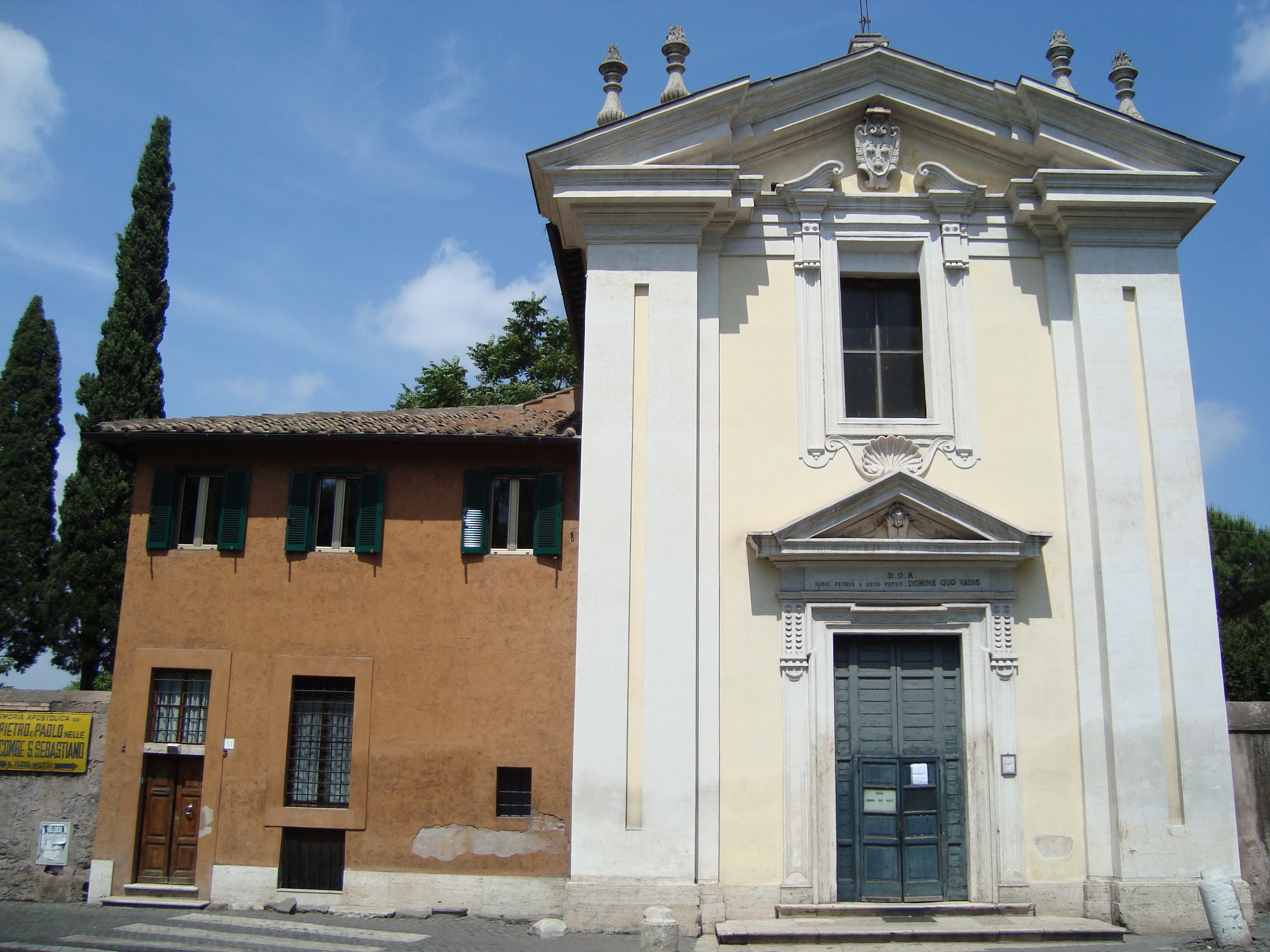 Eglise Domine Quo Vadis ou Santa Maria in Palmis de Rome dans le quartier de l'Appio Latino